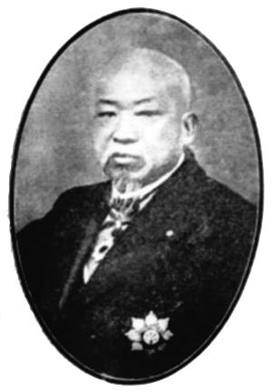 韩国钧（1857年-1942年），字紫石，又作止石、子石，号止叟。江苏泰县海安镇人。